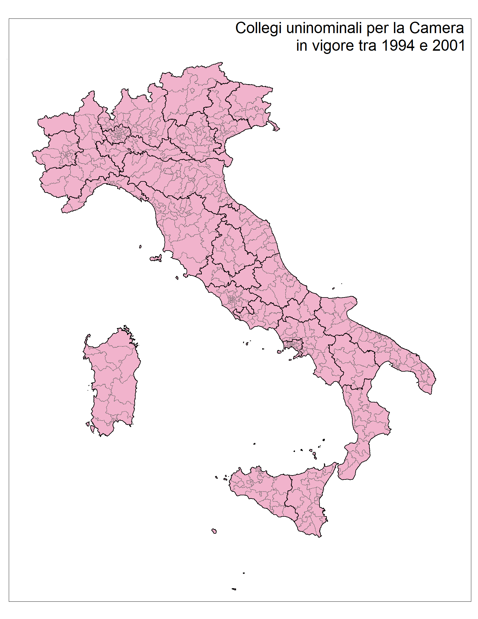 Cartina dei 475 collegi uninominali in cui fu divisa l'Italia a seguito della legge Mattarella in occasione delle elezioni politiche 1994, 1996 e 2001 per la Camera dei Deputati.